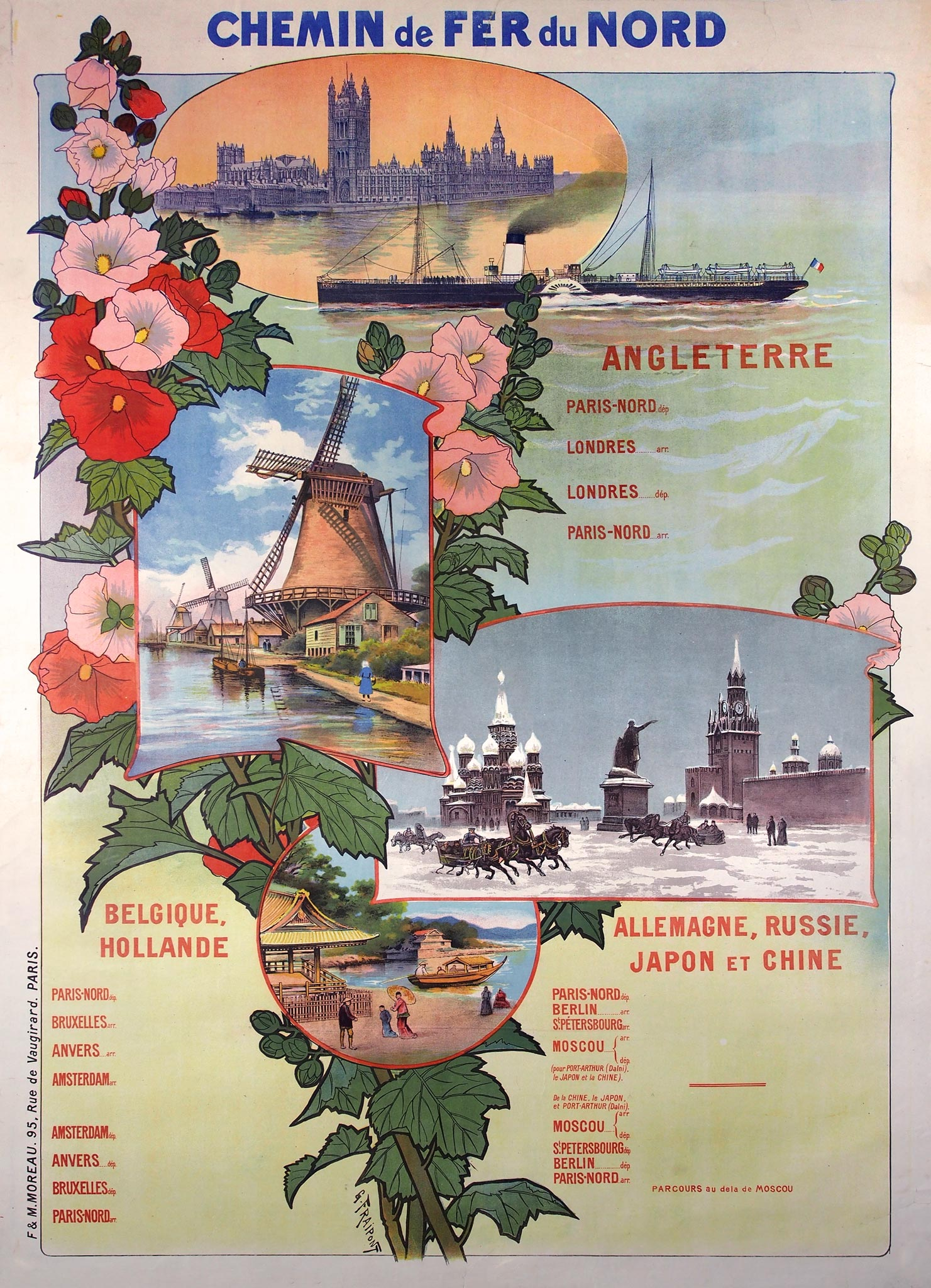 Verzamelaffiche voor alle buitenlandse verbindingen van de Chemin de Fer du Nord. Zo kon het dat Hollandse molens terechtkwamen op één plaat met het Palace of Westminster, het Kremlin en een Chinees of Japans bouwsel. Nord verzorgde namelijk treinreizen naar Engeland, België, Nederland en Duitsland maar ook naar Rusland, China en zelfs Japan. De Nord Express uit Parijs bood namelijk aansluiting op de Transsiberië Express.